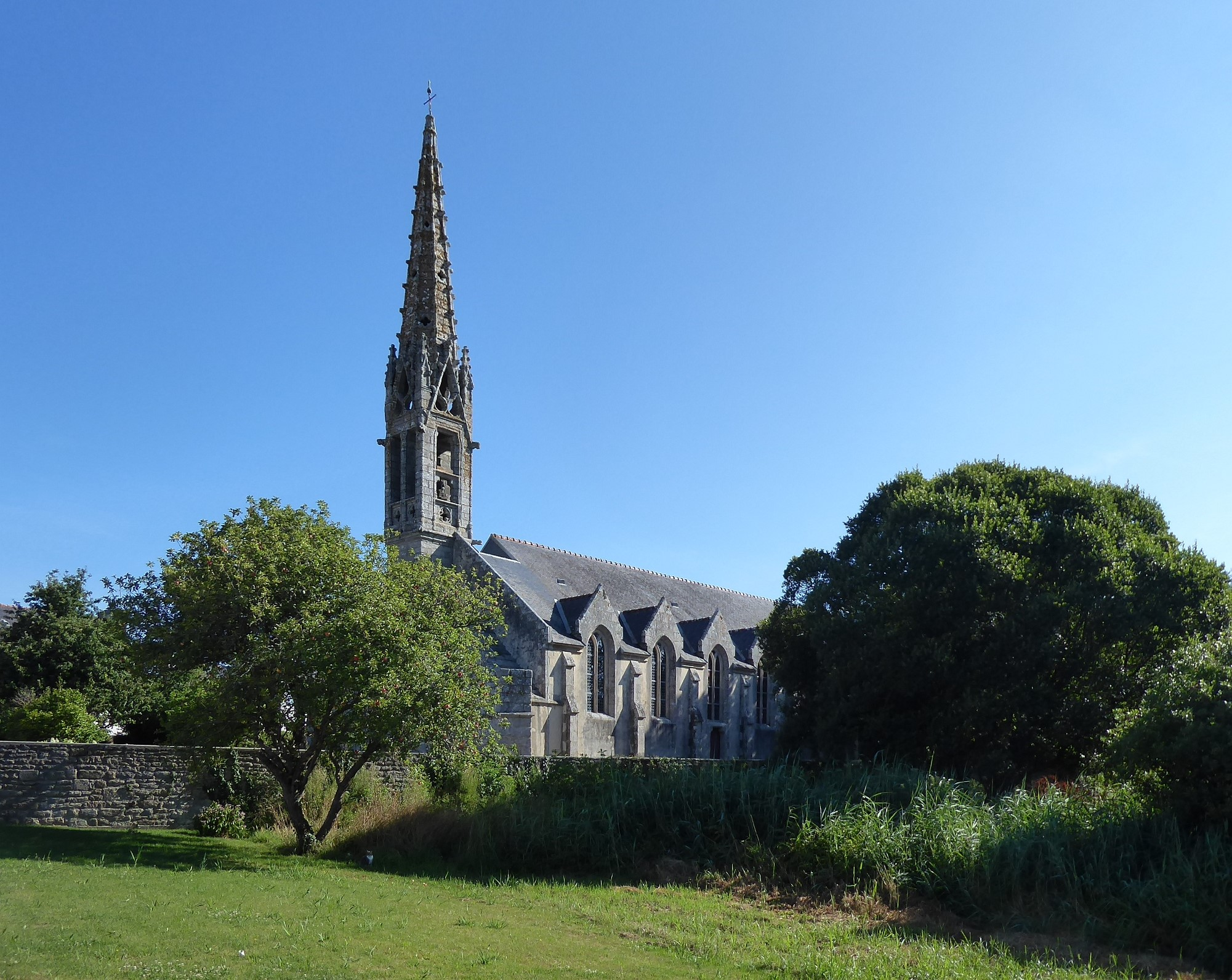 Église Saint-Jean-Baptiste de Saint-Jean-Trolimon